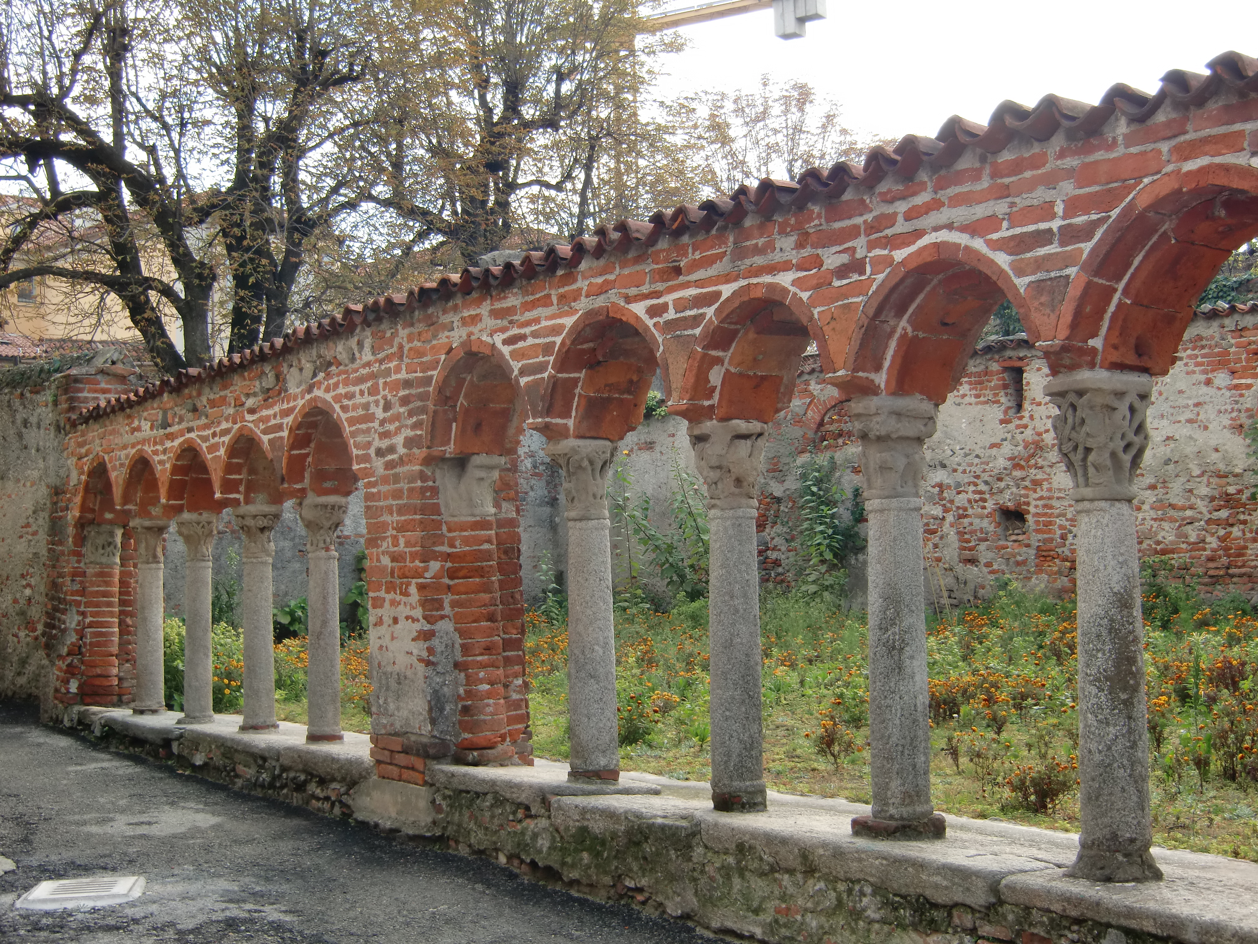 Duomo di Ivrea, Cloister, Ivrea, Turin, Italy